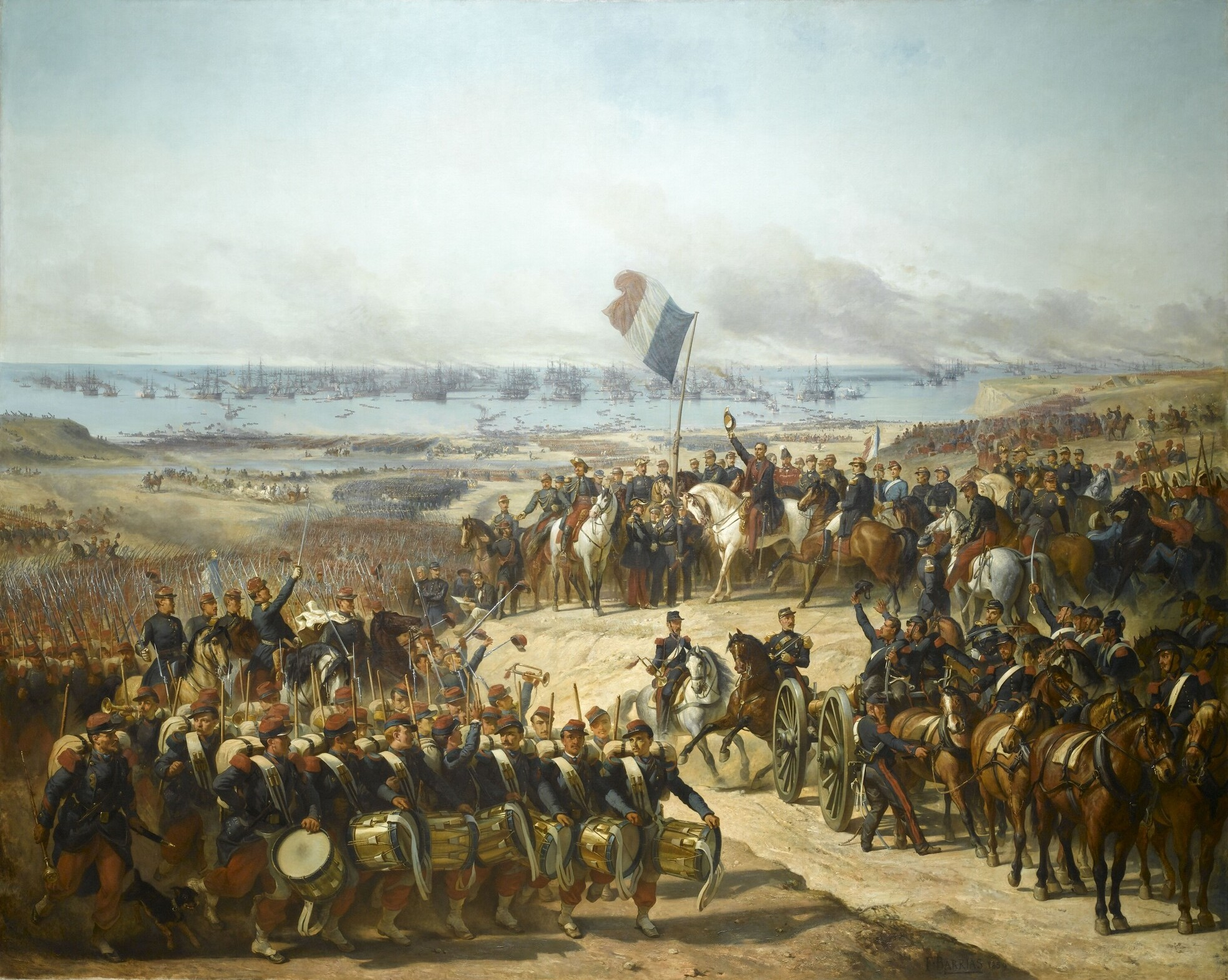 Titre : Débarquement à Old Port, 14 septembre 1854. Guerre de Crimée (1854-1856). Au centre, sur le cheval blanc et saluant les troupes, le maréchal de Saint-Arnaud.